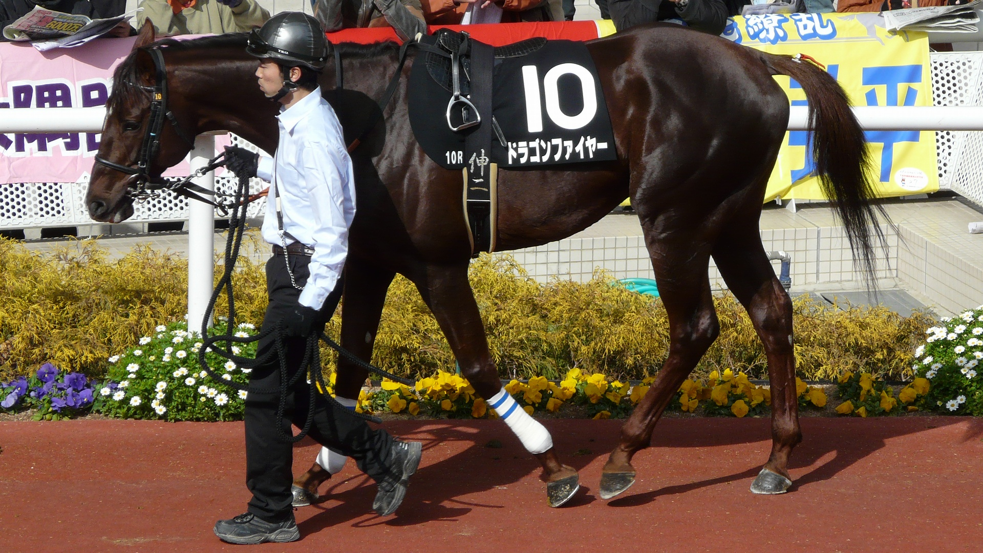 ドラゴンファイヤー